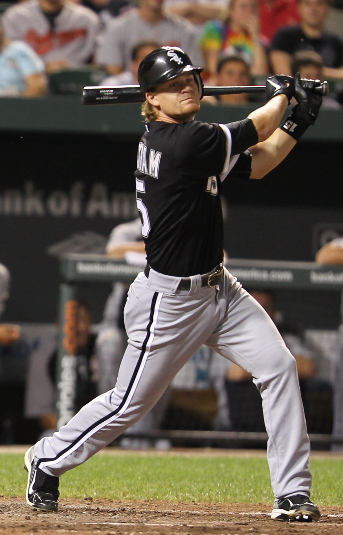 Gordon Beckham